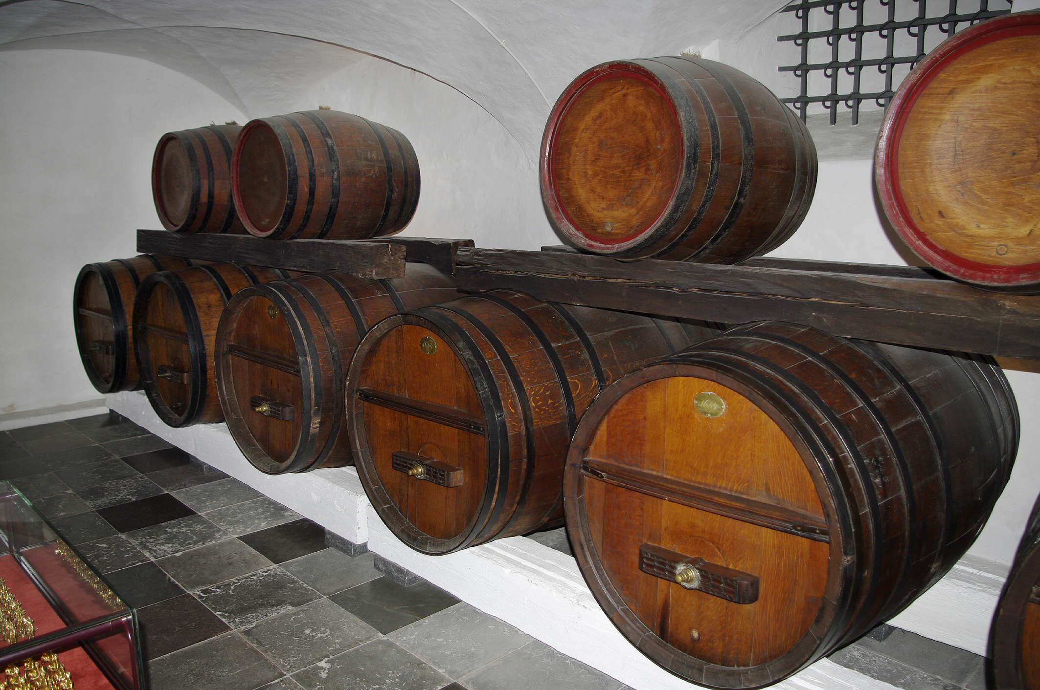 Tanks with the kings wine from the 1600s in Rosenborg Castle basement.